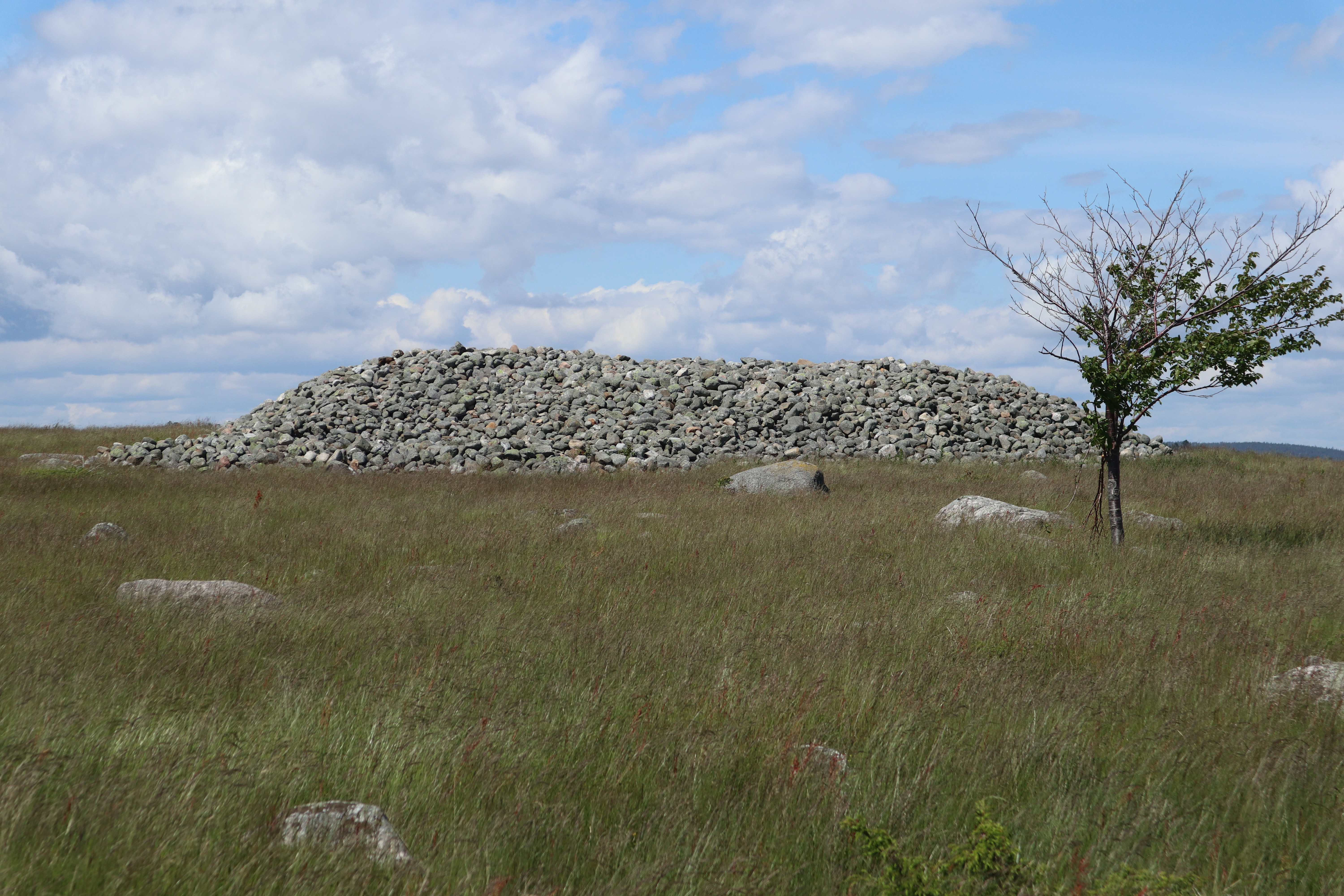 Gravrøys østligst på Jerkholmen. Tre i forgrunnen th